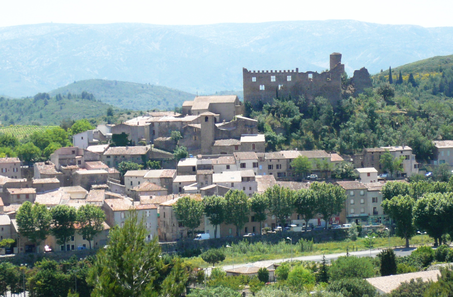 Chateau de Durban-Corbières (Aude)